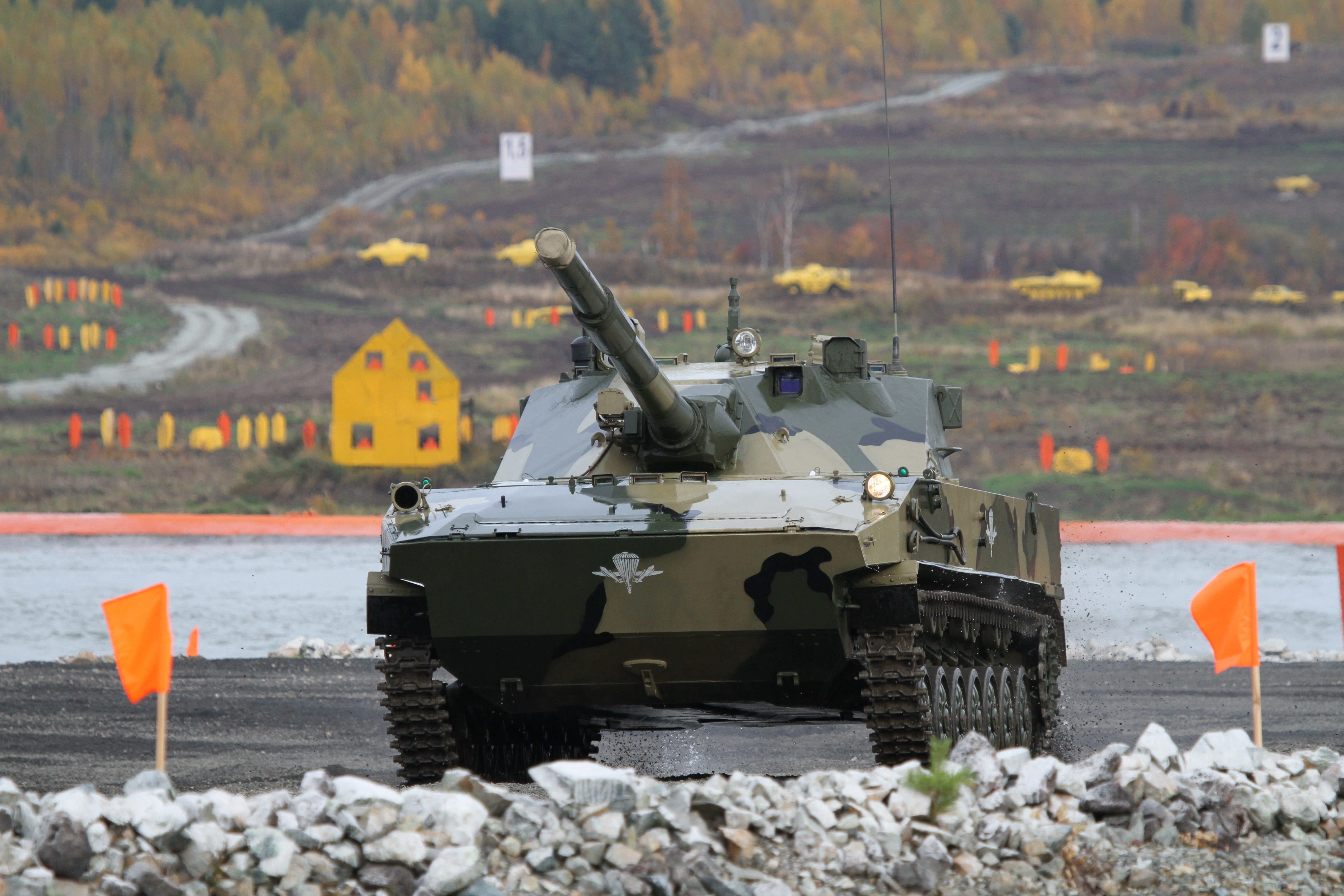 2С25 Спрут-СД (2S25 Sprut-SD)